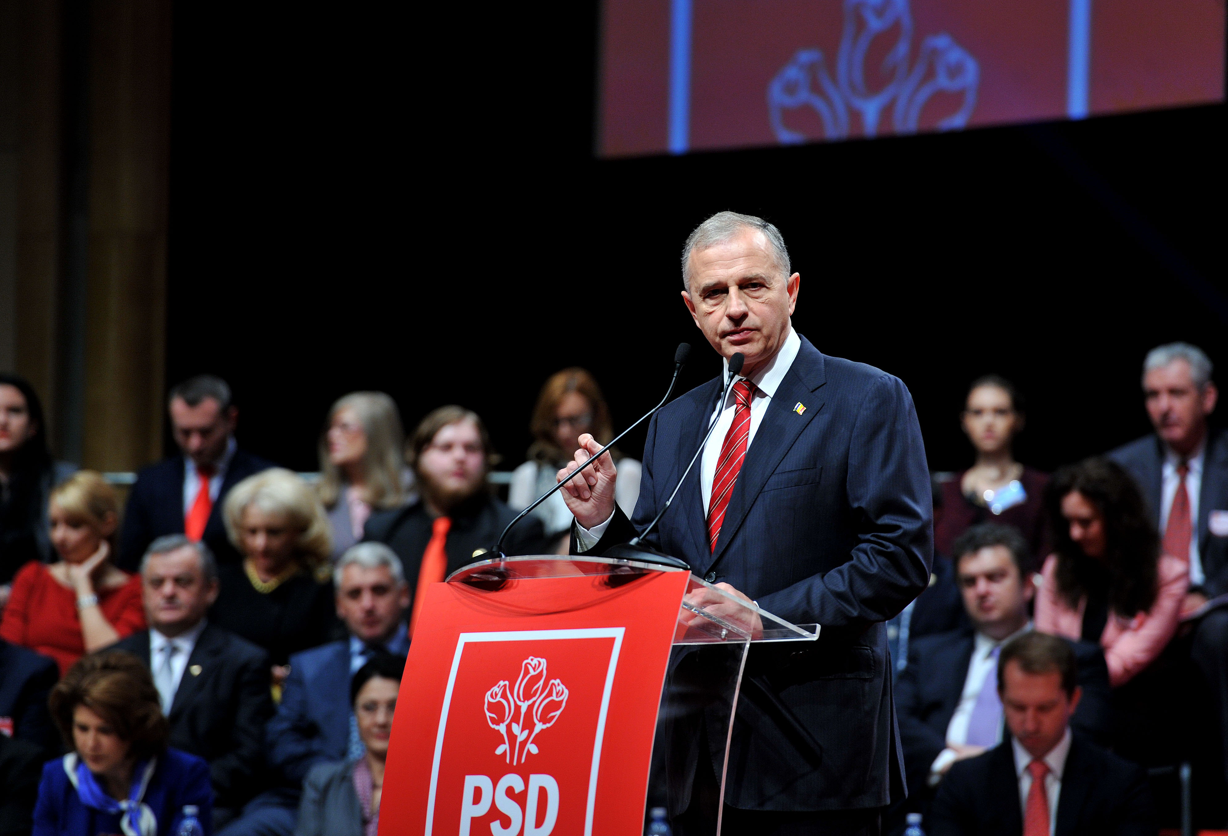 Mircea Geoana la Consiliul National al PSD